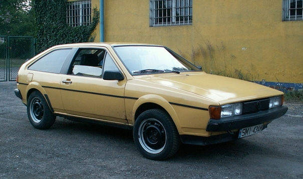 Volkswagen Scirocco author:Marek Ruchwa